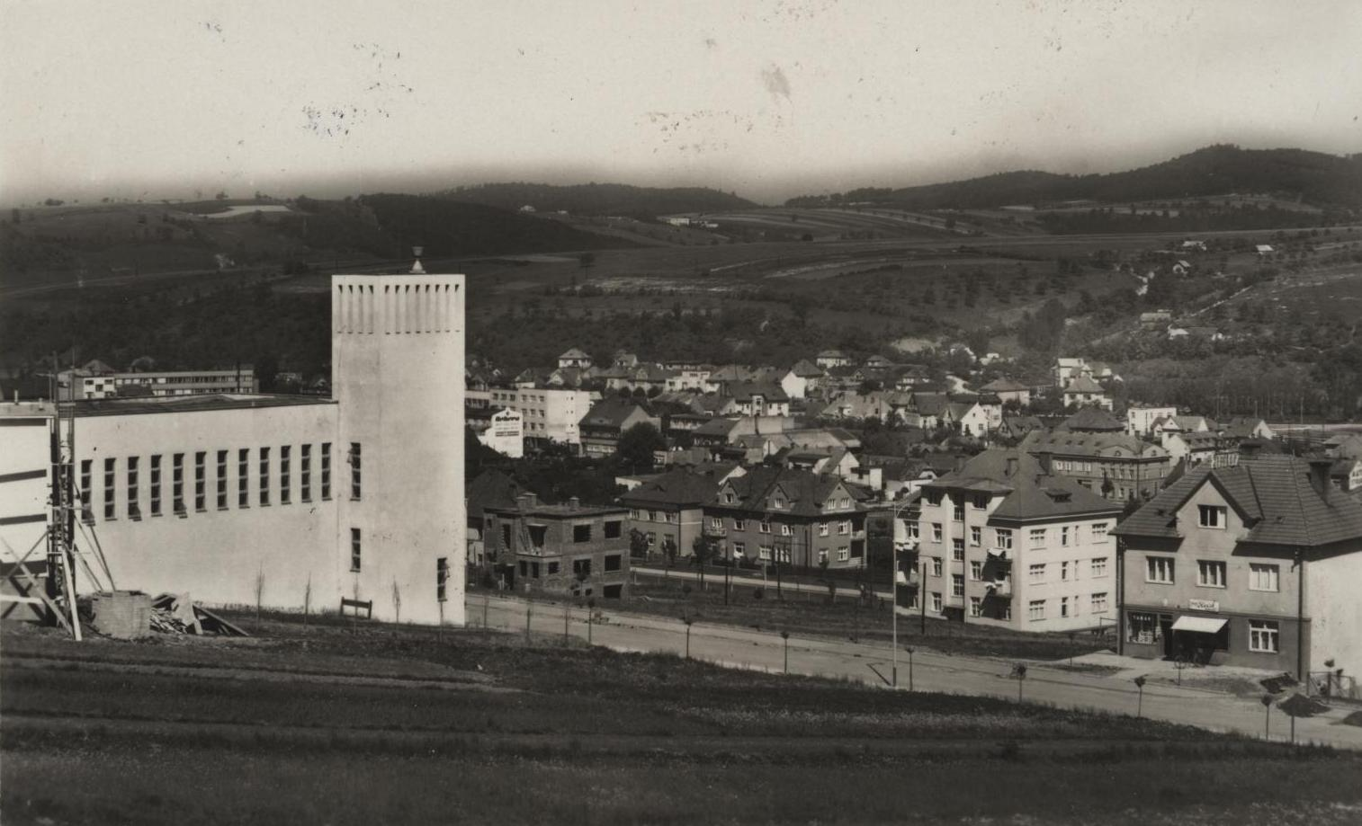 Zlín, evangelický kostel, do 1940